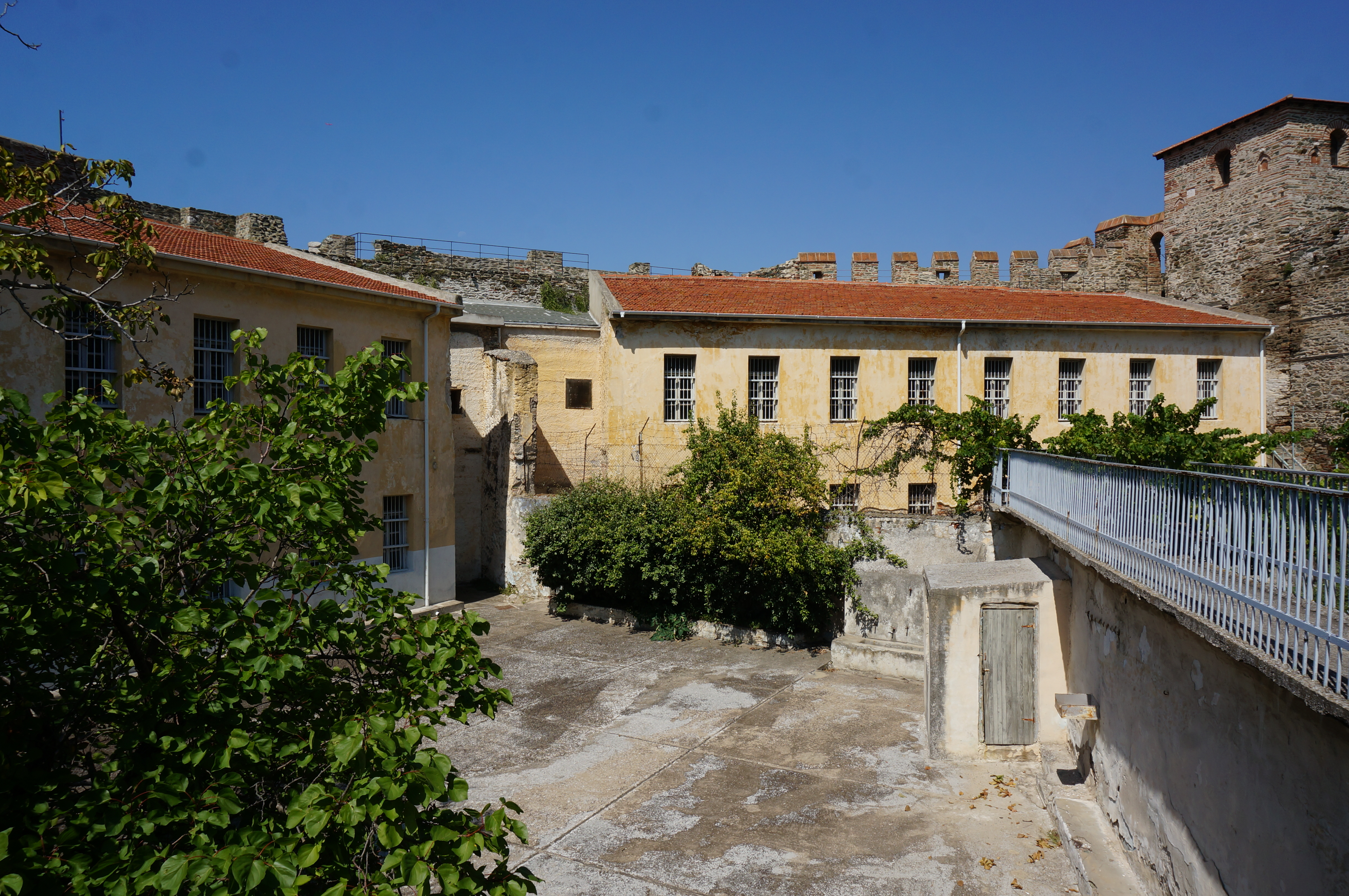 dans la ville de Salonique.